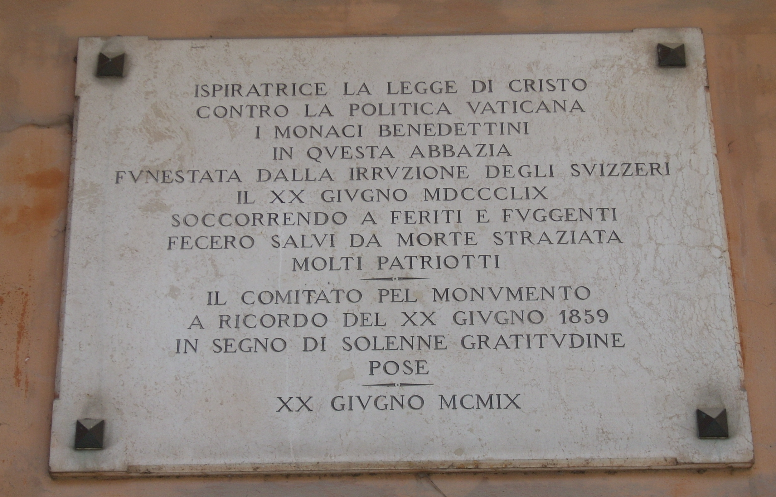 Epigrafe XX giugno 1859 nel chiostro dell'Abbazia di San Pietro a Perugia.